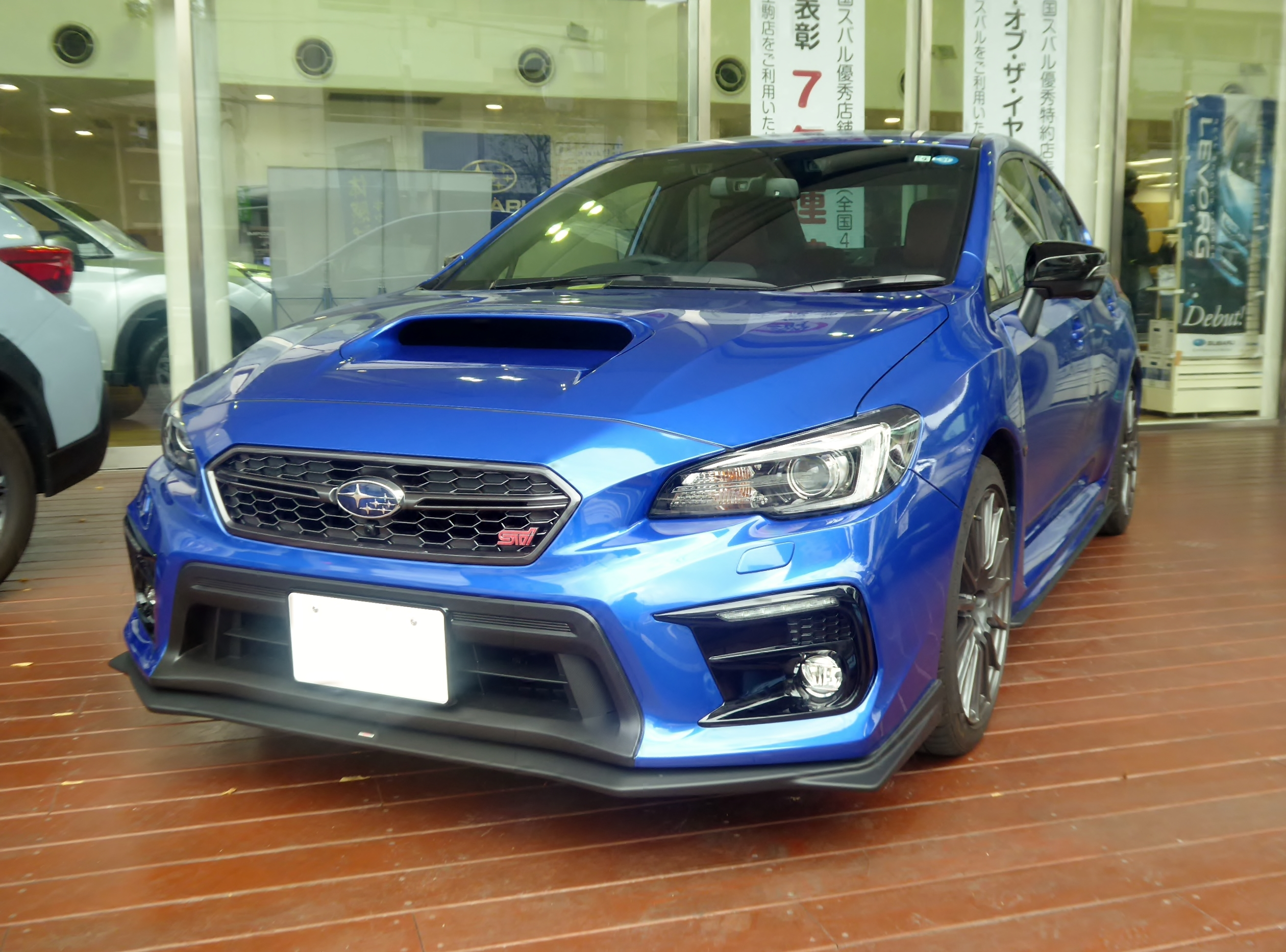 DBA-VAG型スバル・WRX S4 STI Sport EyeSightをフロントから撮影。